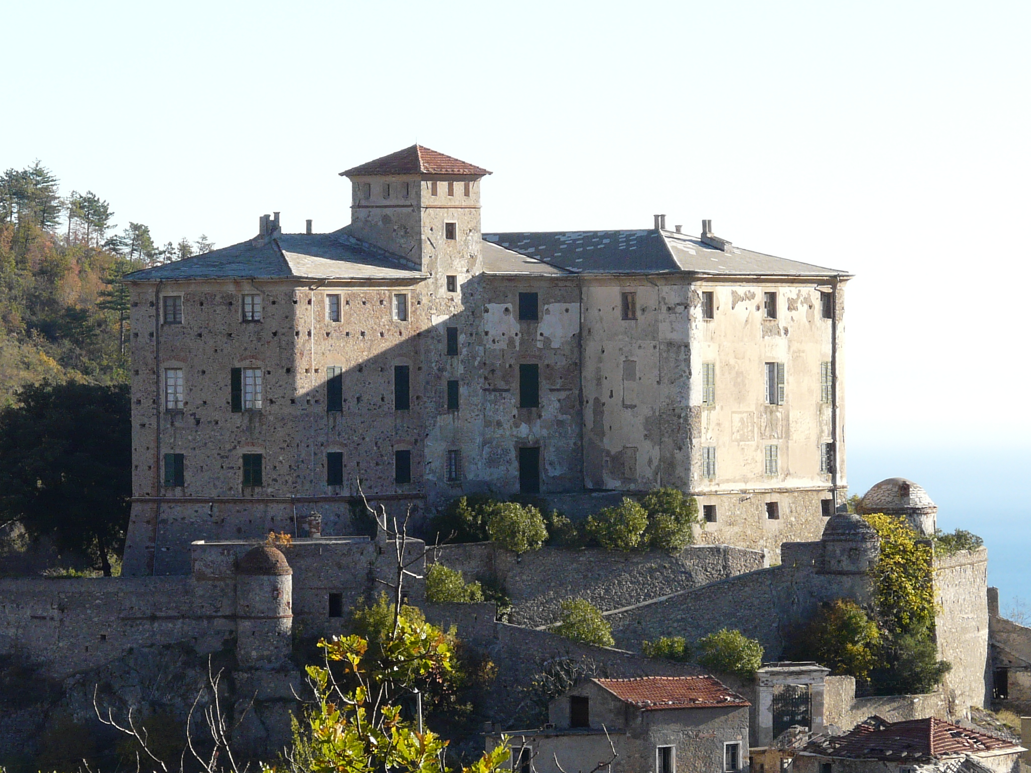 Castello di Balestrino, Liguria, Italia